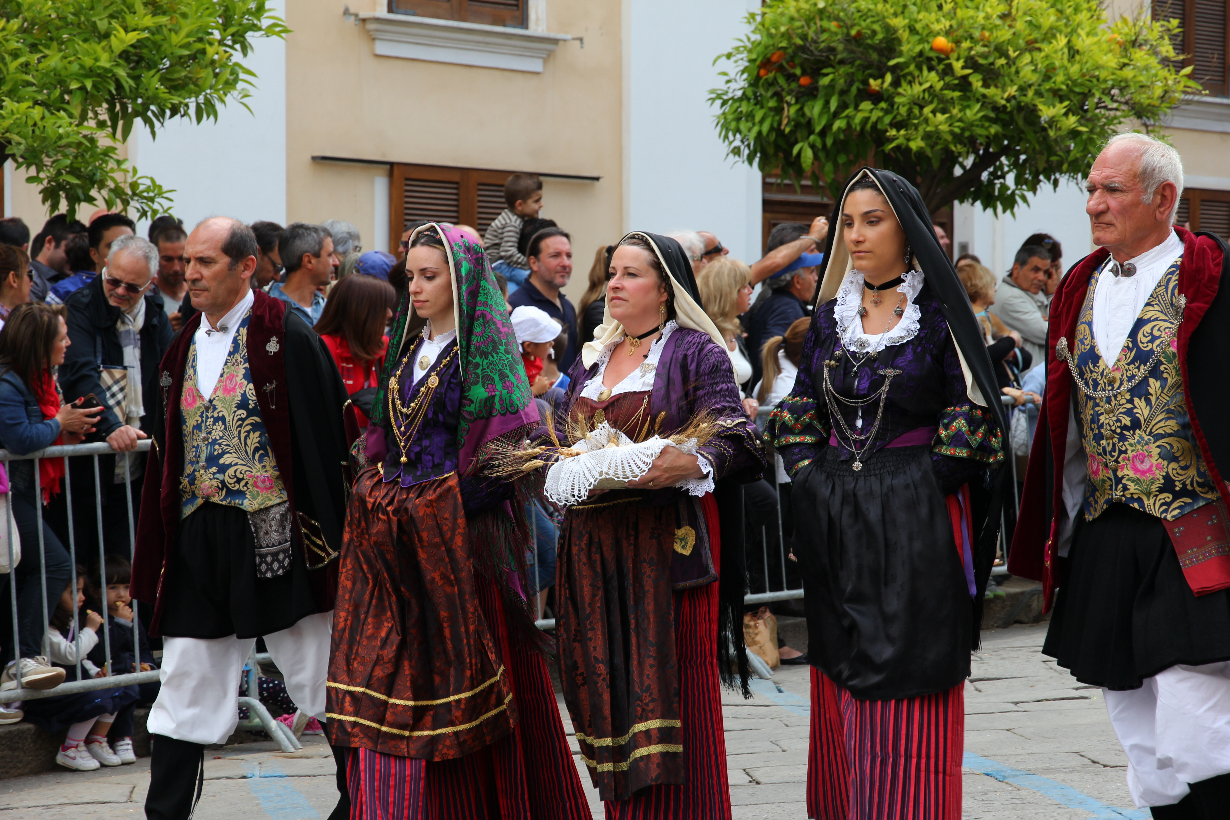 Costume tradizionale